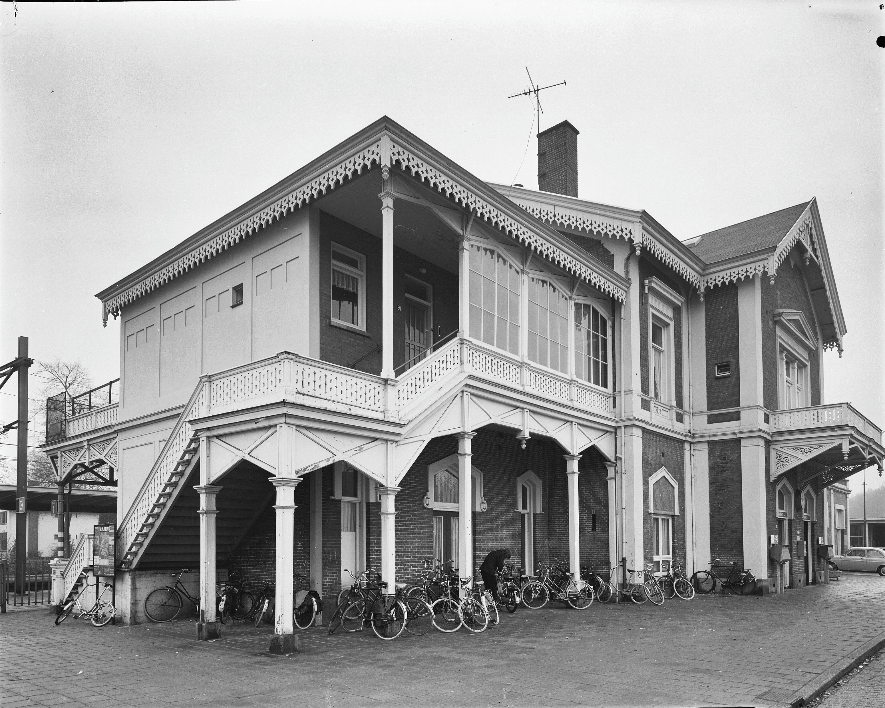 Stations.: voor- en linkerzijgevel